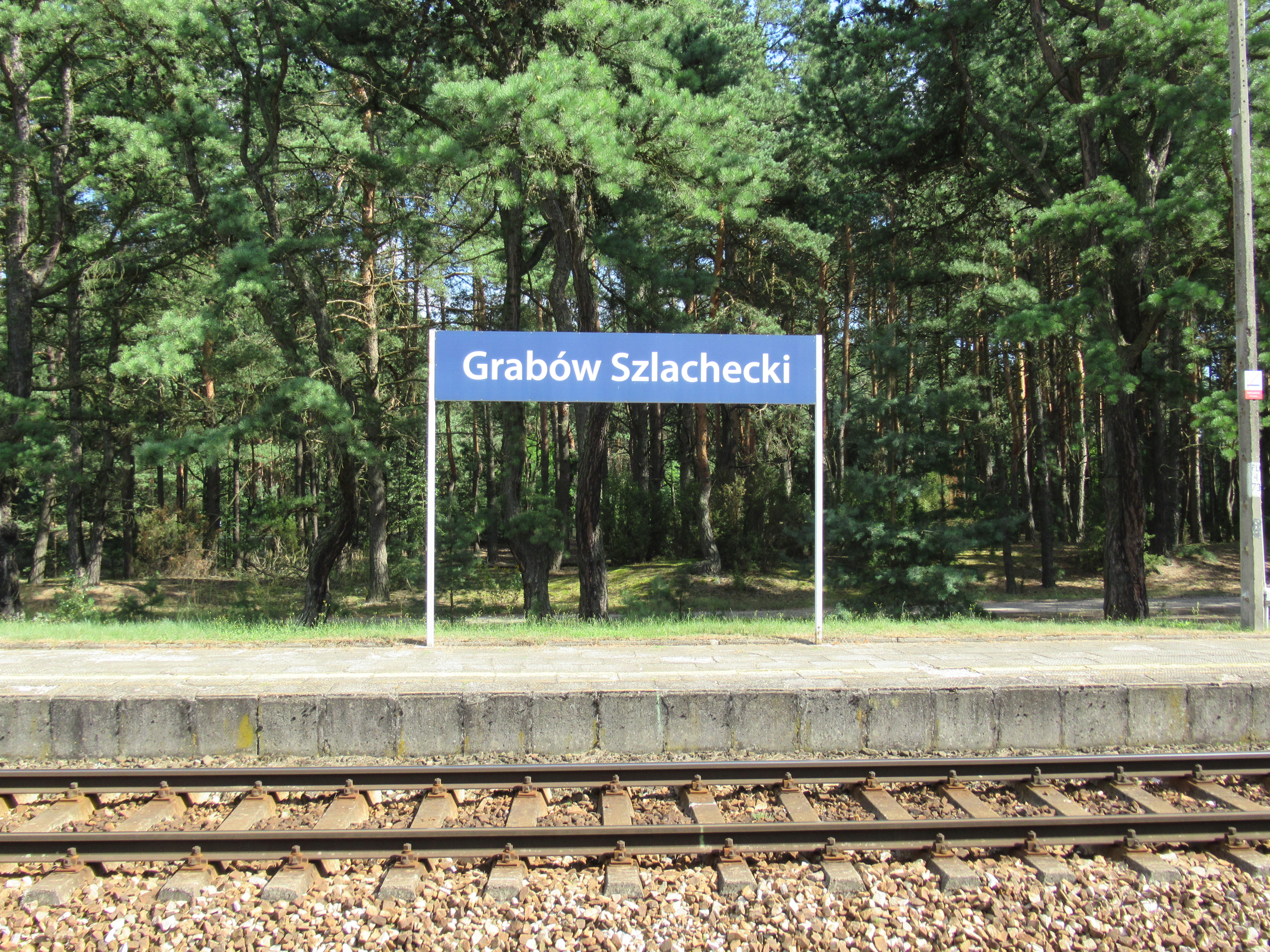 Przystanek kolejowy w Grabowie Szlacheckim (pow. rycki, woj. lubelskie, Polska). Tablica z nazwą przystanku.